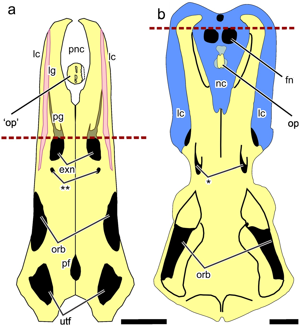 Dorsal view of the skulls of Ornithorhynchus anatinus and Eretmorhipis carrolldongi. (a) E. carrolldongi. (b) O. anatinus, based on a published figure. Colors: black, cranial fenestrations; brown, prenasal groove; light blue, prenasal and labial cartilages; light yellow, bone; pink, groove for labial cartilage. Symbols: exn23, external naris; fn, fenestra naria, located below exn; lc, labial cartilage; lg, labial groove for labial cartilage; nc, nasal capsule; op, os paradoxum; orb, orbit; pf, pineal foramen; pg, prenasal groove; pnc, prenasal cartilage of unknown homology; utf, upper temporal fenestra; *unnamed foramen for passage of a branch of the ethmoidal nerve; **foramen analogous to *. Brown dotted lines mark the anterior extent of the external naris, and therefore of the nasal capsule and associated structures, illuminating that the intercrural space of Eretmorhipis is in front of the nasal capsule, unlike in Ornithorhynchus. Scale bars are 1 cm long.